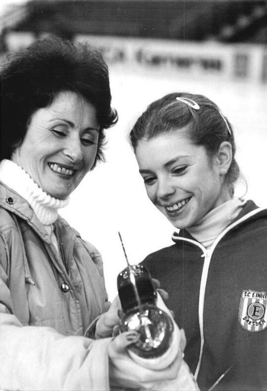 Ingrid Lehmann, Simone Koch ADN-ZB Häßler 24.12.1982 Dresden: Glückliche Gesichter zeigen Trainerin Ingrid Lehmann und Schützling Simona Koch (beide SC Einheit Dresden). Bei den Junioren-Weltmeisterschaften im Eiskunstlaufen in der Olympiastadt Sarajewo erkämpfte sich die 14jährige Dresdnerin kürzlich den Titel bei den Mädchen. Nun hofft man auf ein gutes Abschneiden bei den kommenden DDR-Meisterschaften vom 6. bis 9. Januar 1983 in der Eishalle des Berliner Sportforums.